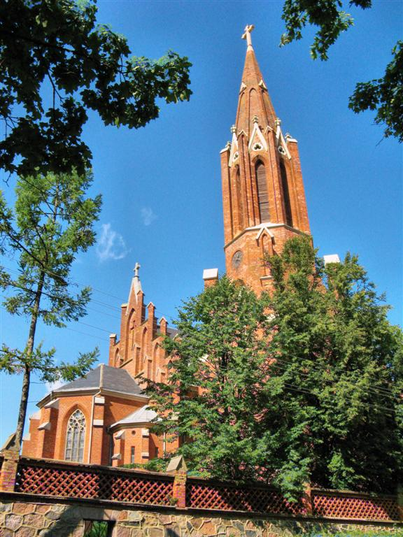 Rokiškio Šv. apaštalo evangelisto Mato bažnyčia